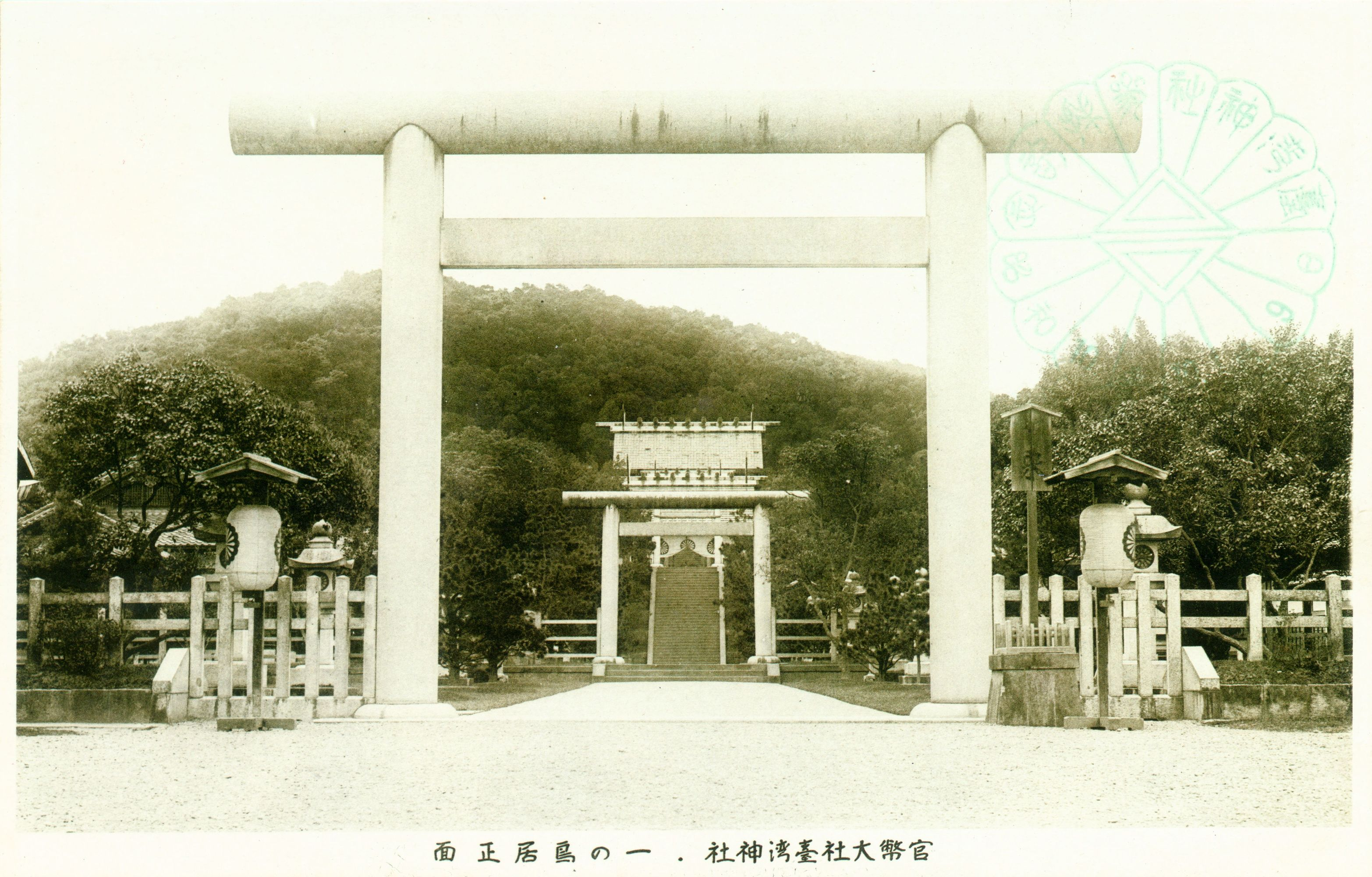 中文（台灣）: 官幣大社臺灣神社鳥居正面